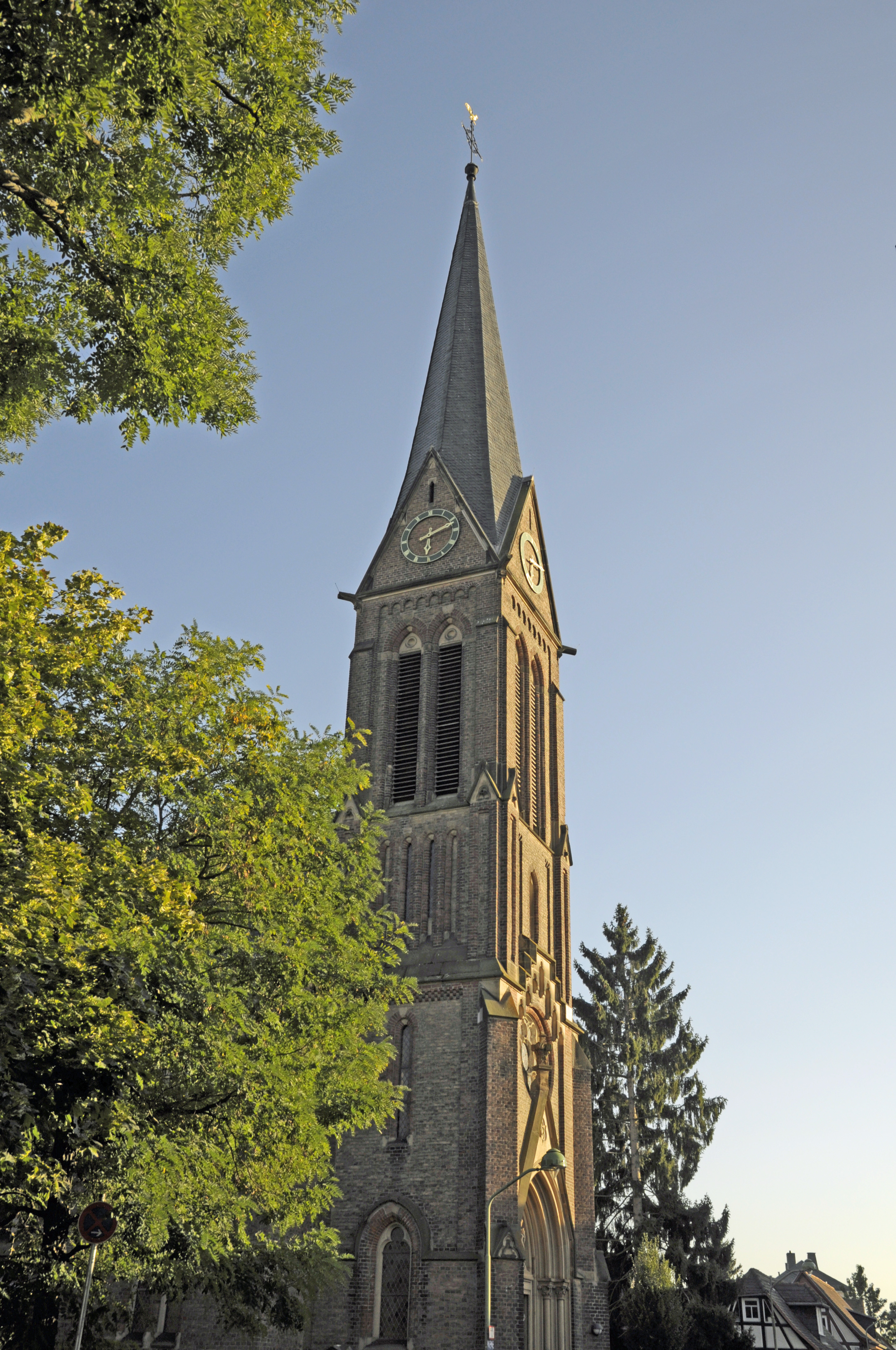 Außenansicht der Kirche St. Peter und Paul in Heddernheim